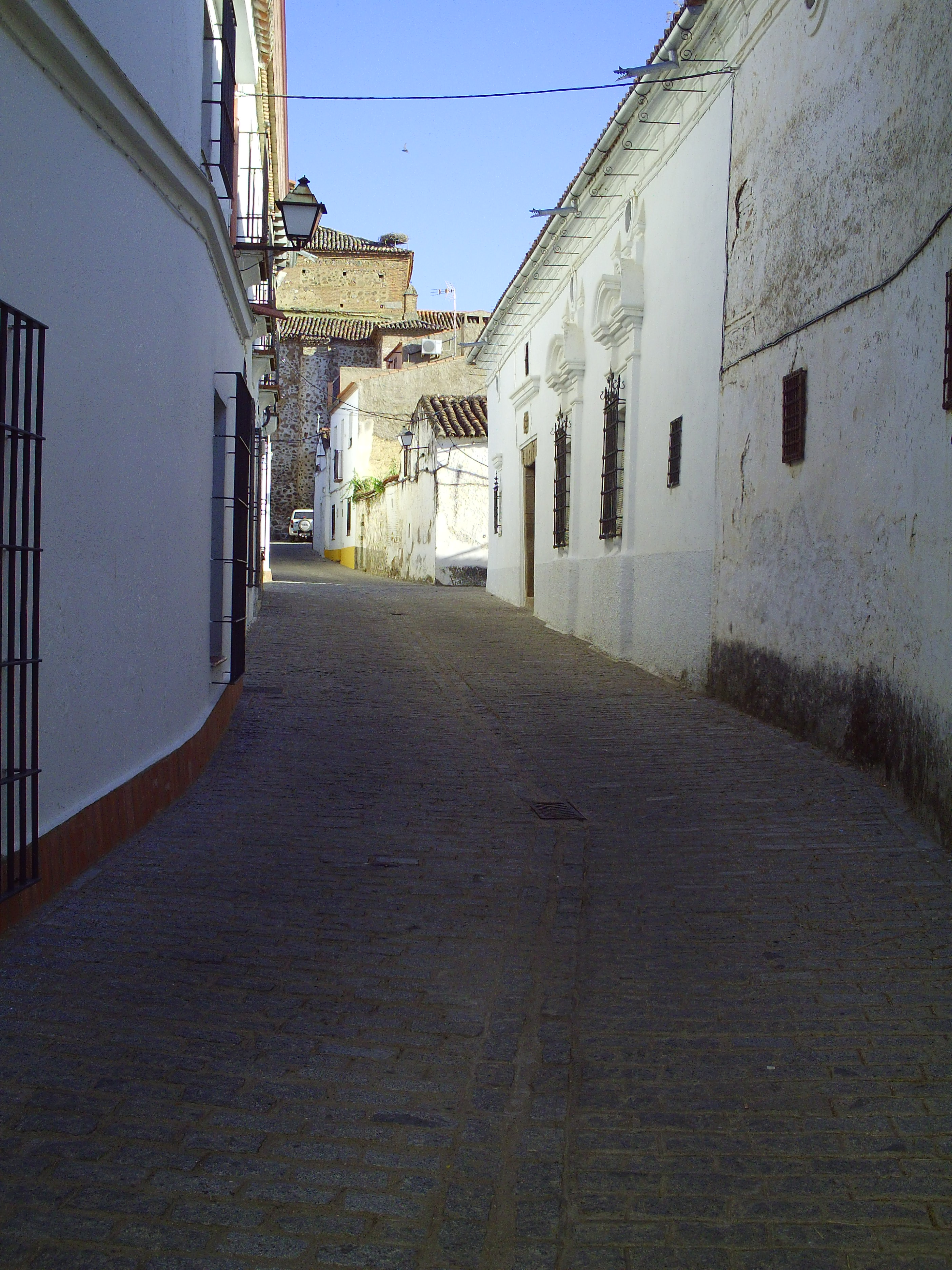 Calle San Juan Herrera del Duque